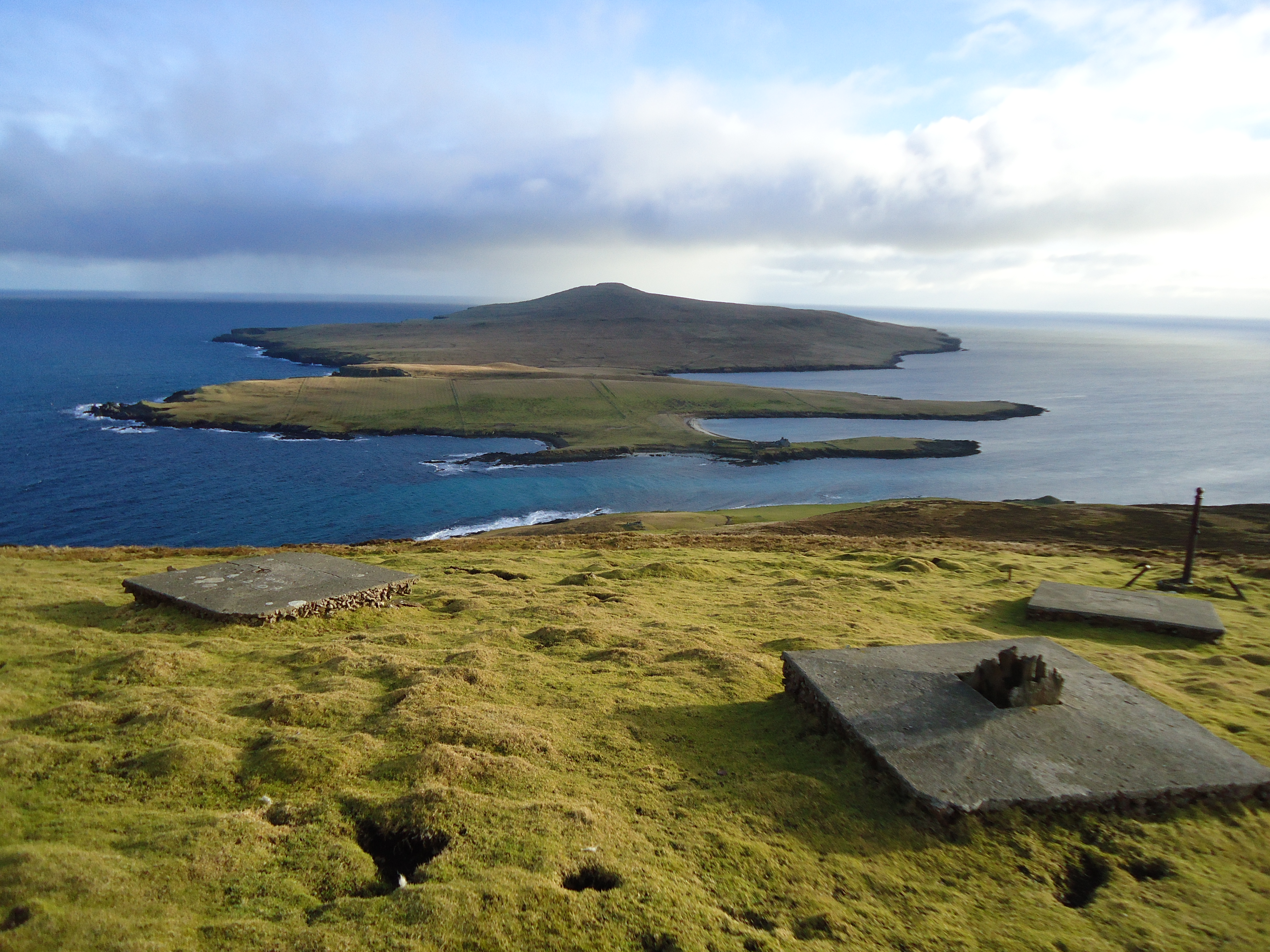 Vue de l'île de Noss à partir de l'île de Bressay, en Hiver, dans l'archipel des Shetland en Ecosse.